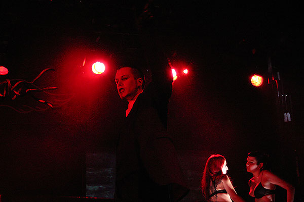 Beschreibung: Chris Pohl, Sänger von Blutengel. Konzertfoto vom Mera Luna 2004. Quelle: Lichtjäger - Grufti on Tour - In-Concerts Fotograf / Zeichner: Stefan Füsers/Lichtjäger